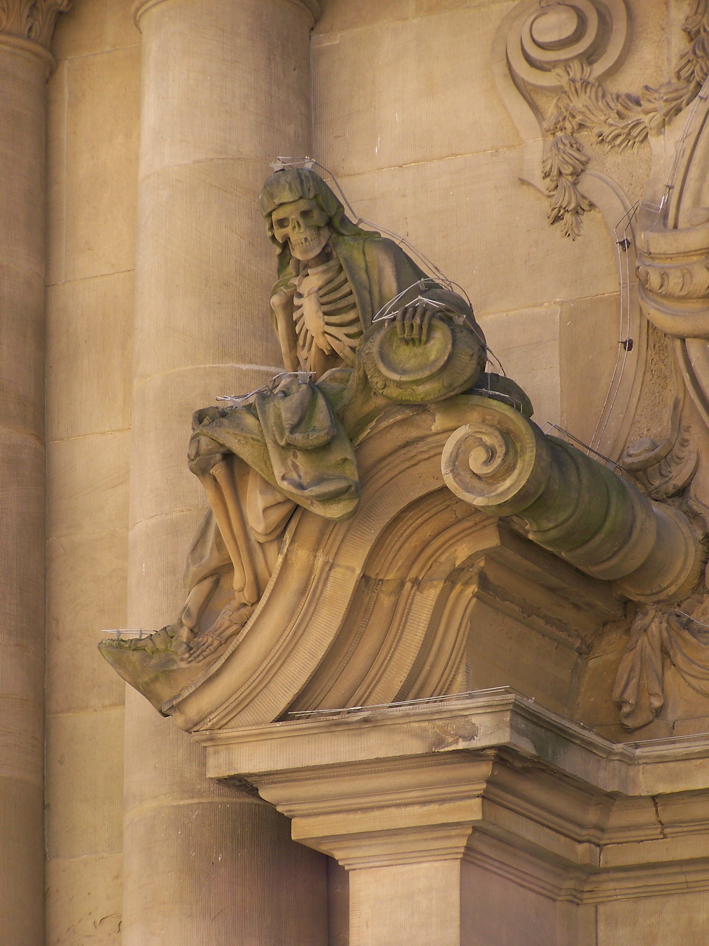 Steinskulptur über dem Portal der Schönbornkapelle am Würzburger Dom St. Kilian